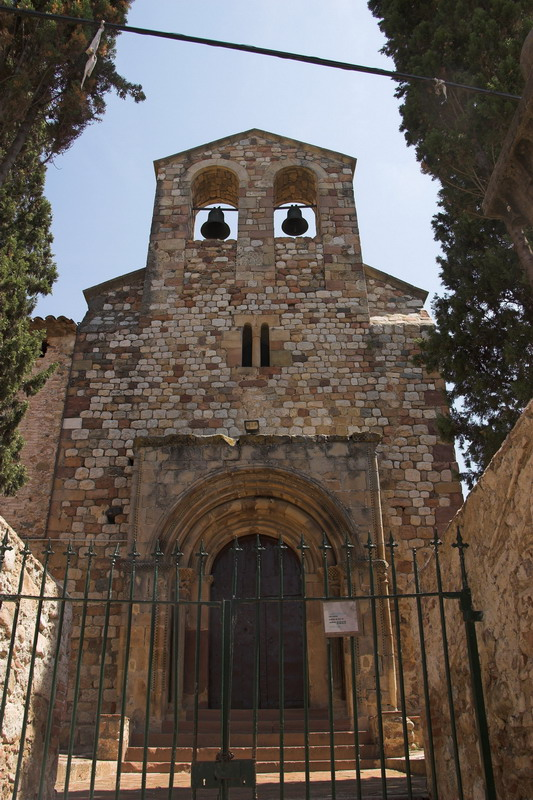 Església de Sant Feliu (Canovelles, Vallès Oriental, Catalonia, Spain) Romànic / Románico / Romanesque s.XI.